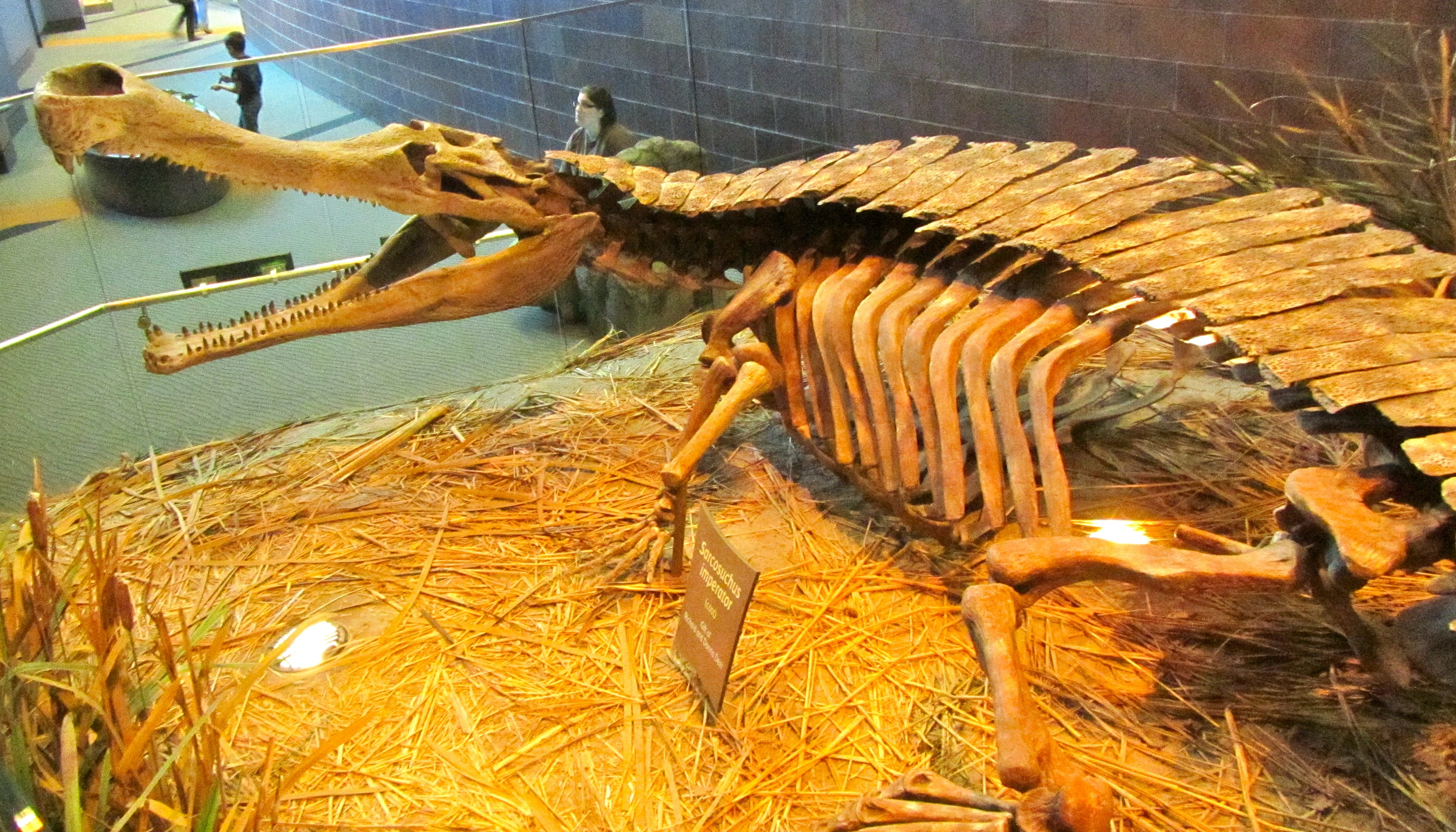 Super Croc